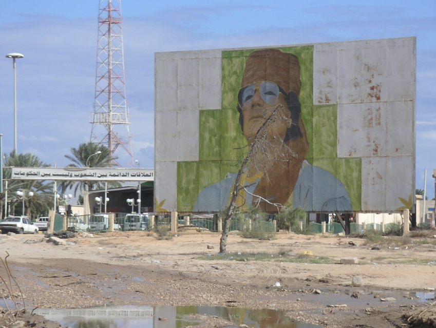 Portrait de Mouammar Kadhafi à l'entrée en Libye, Ras Jedir